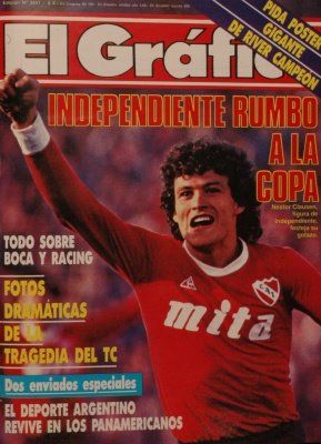 Néstor Clausen de Independiente festeja su gol. Revista El Grafico N°3541